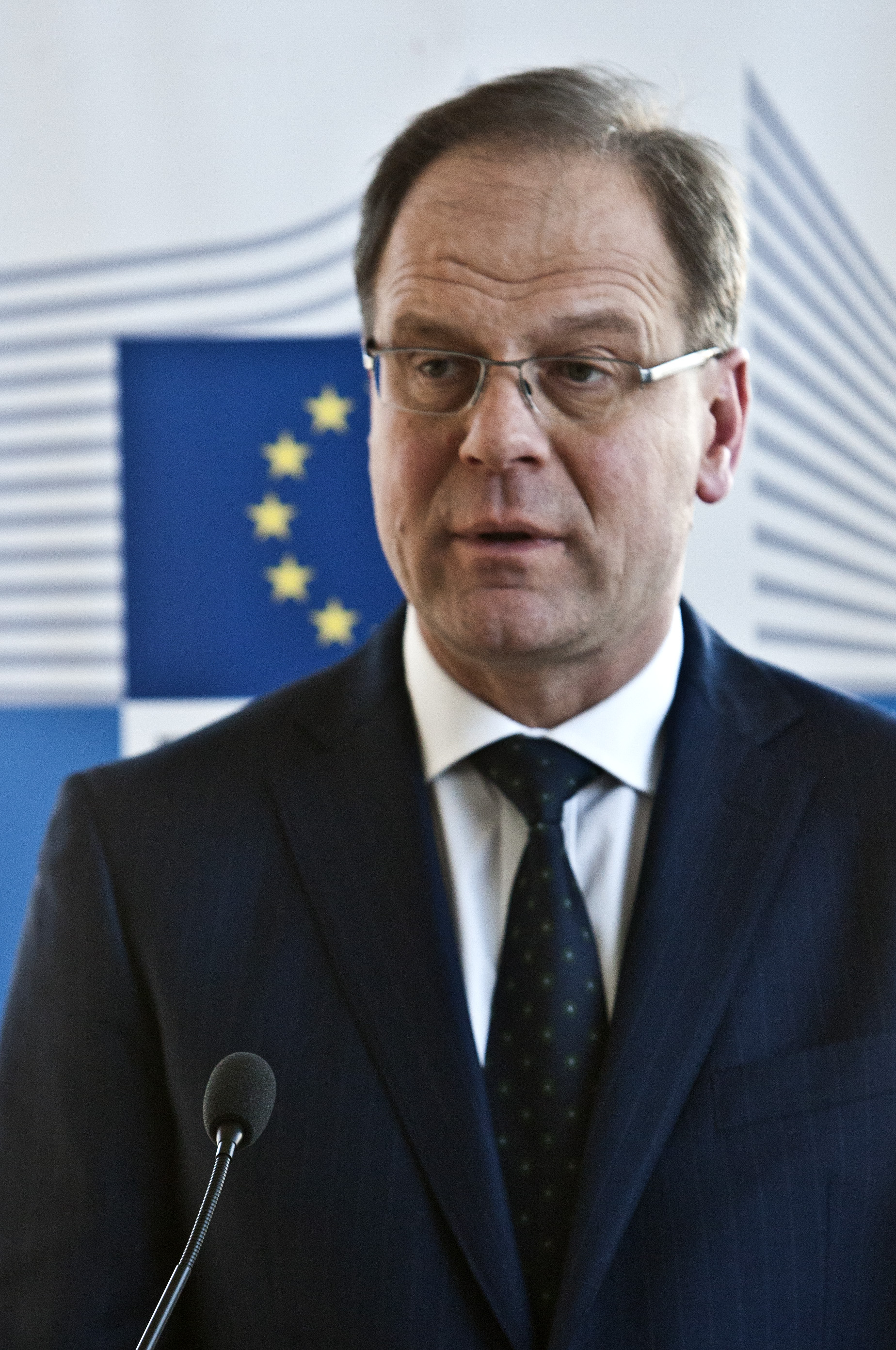 Navracsics Tibor az Európai kulturális, oktatási, ifjúságpolitikai és sportügyi biztosa meglátogatta az Európapontot, ahol ismertette az Európai Bizottság 2015-ös munkaprogramját.